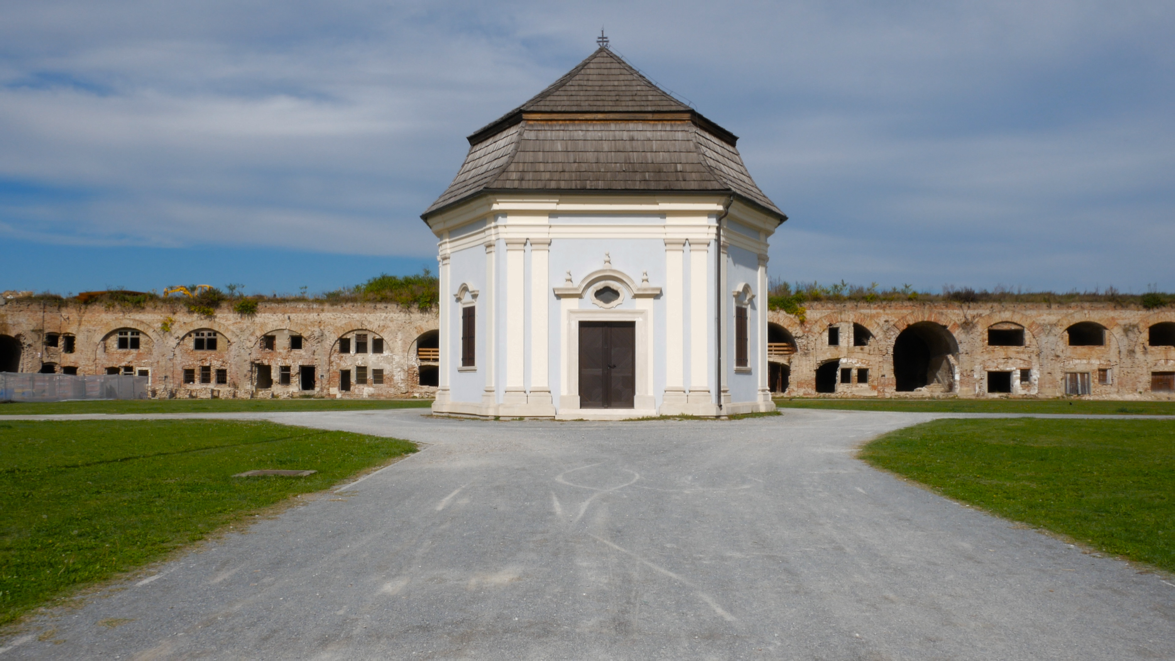 Kapelica sv. Ane u Slavonskom Brodu